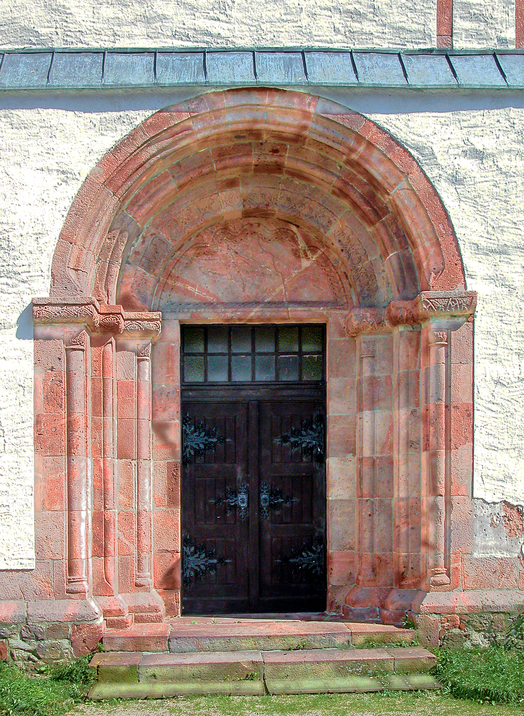 01.09.2009 04643 Geithain: St. Nikolaikirche (GMP: 51.054307,12.689032). Spätromanischer Westbau mit reichem Portal. [DSCN38759.TIF]20090901320DR.JPG(c)Blobelt